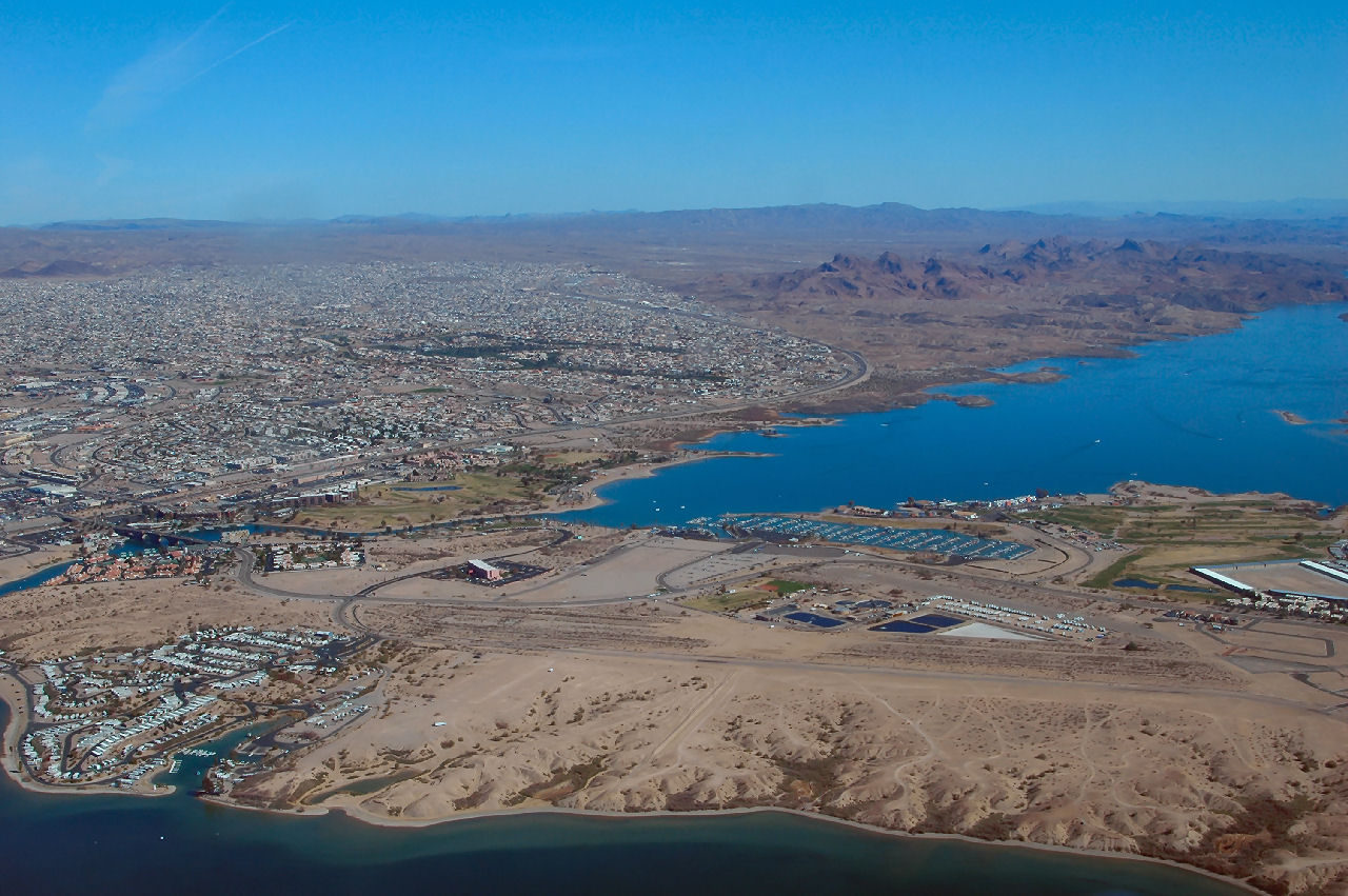 Lake Havasu City, Arizona